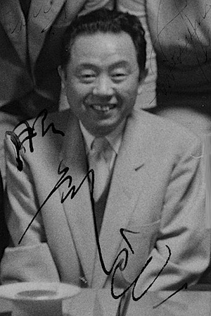 Japanese composer Ryōichi Hattori (服部良一)